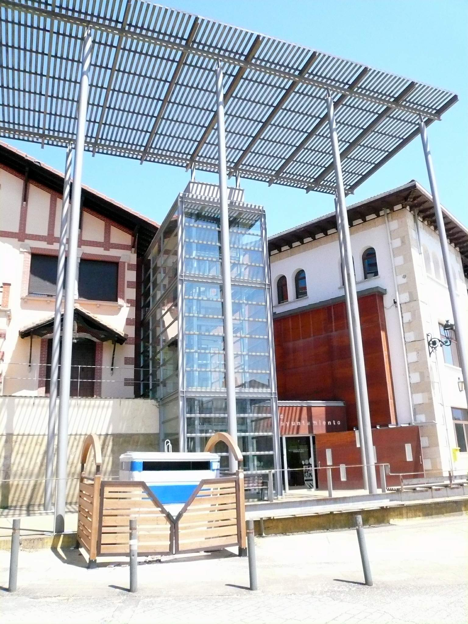 Ayuntamiento de Valdegovía en Villanueva de Valdegovía (Álava)